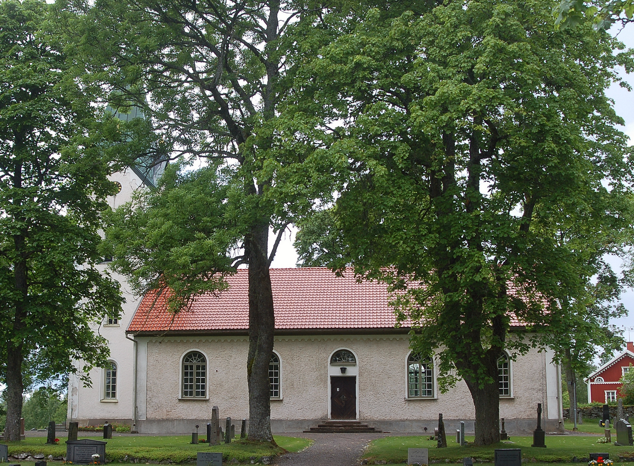 Tived kyrka, Tived, Laxå Sweden.